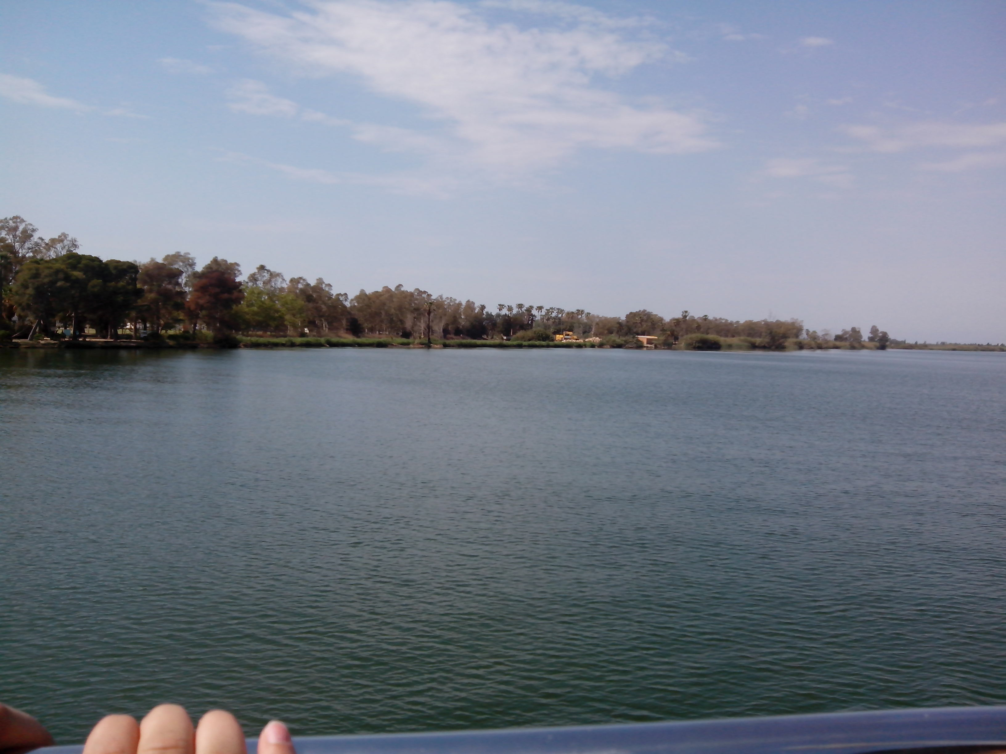 El riu Ebre a la seva desembocadura vist des d'un vaixell.